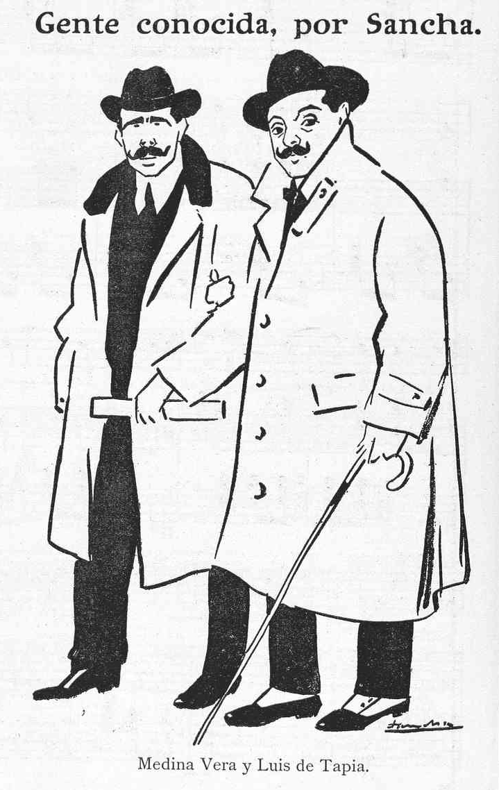 Gente conocida, por Sancha. Medina Vera y Luis de Tapia.